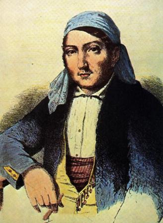 Grabado de Luuis Candelas